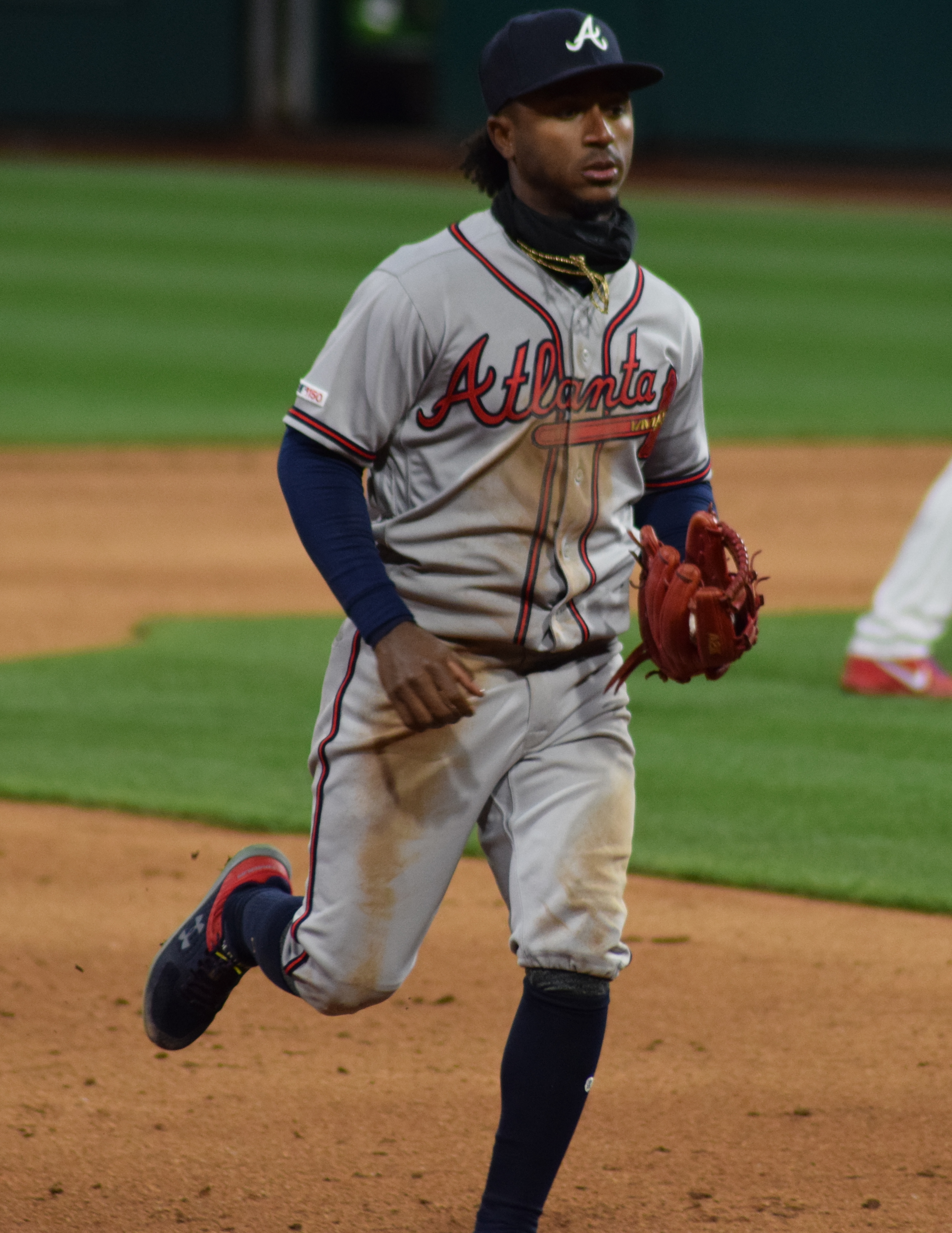 Ozzie Albies